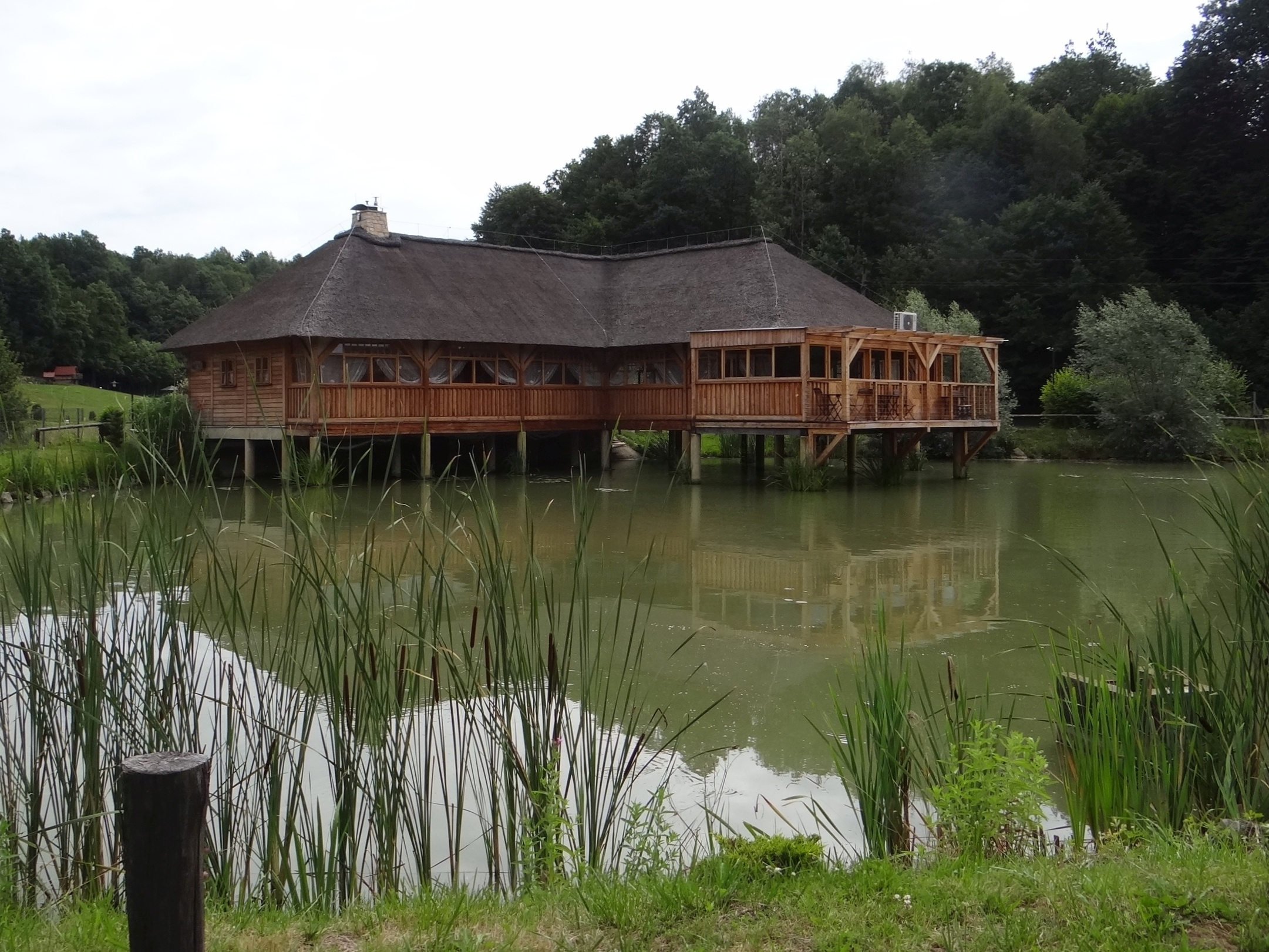 Olchawa. Dom na wodzie